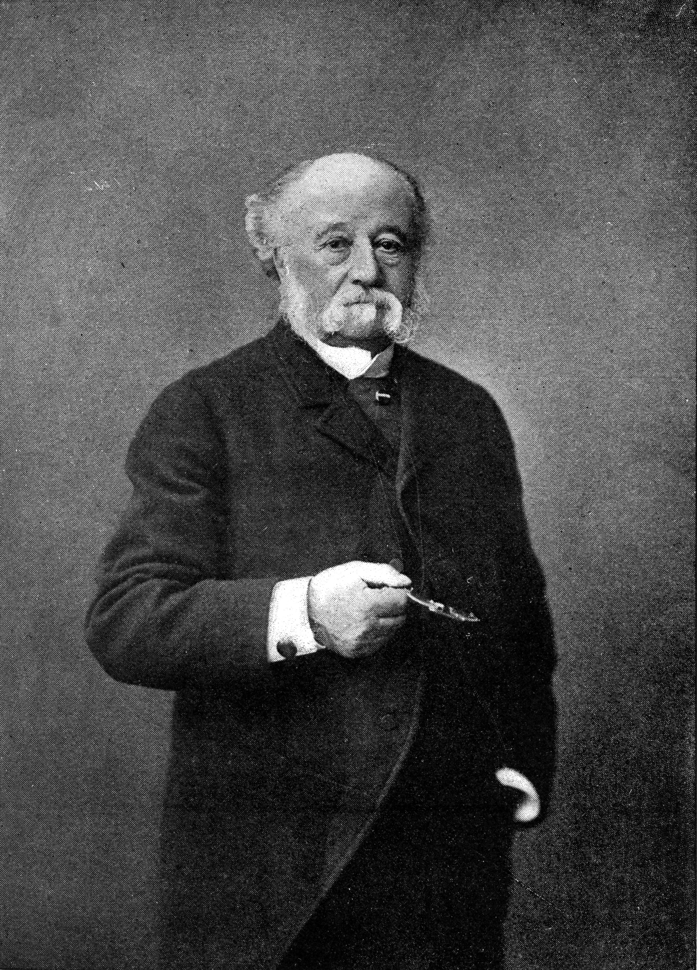 Photographie en noir et blanc de Gustave Le Vavasseur (1819-1896)